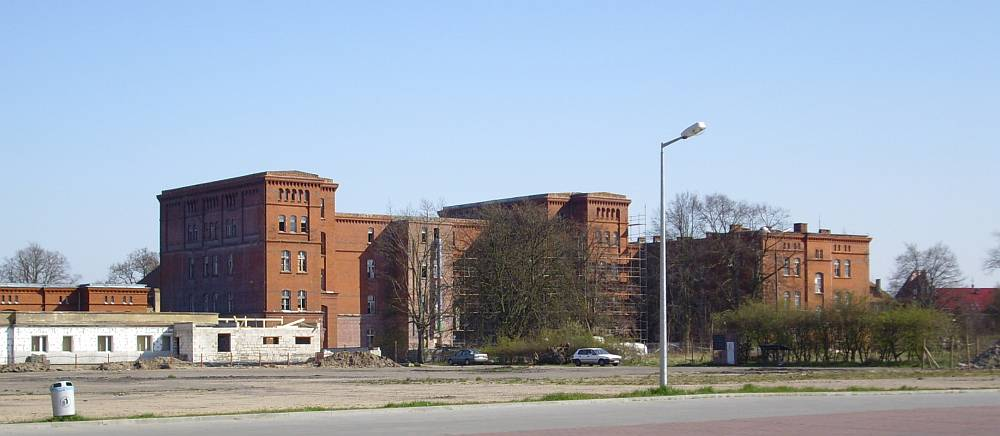 Kołobrzeg. Dawne koszary.